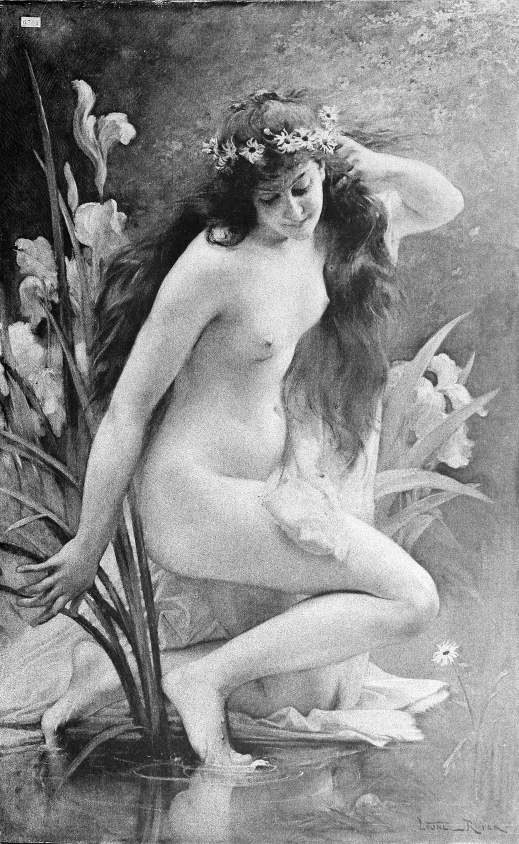 La source